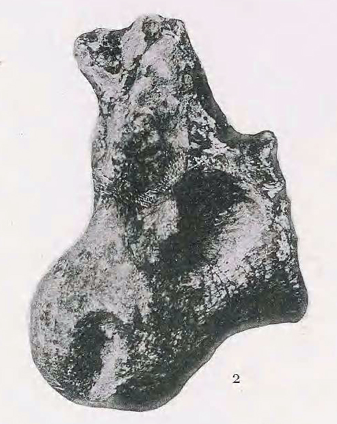 Microcoelus patagonicus Dorsal vertebra.